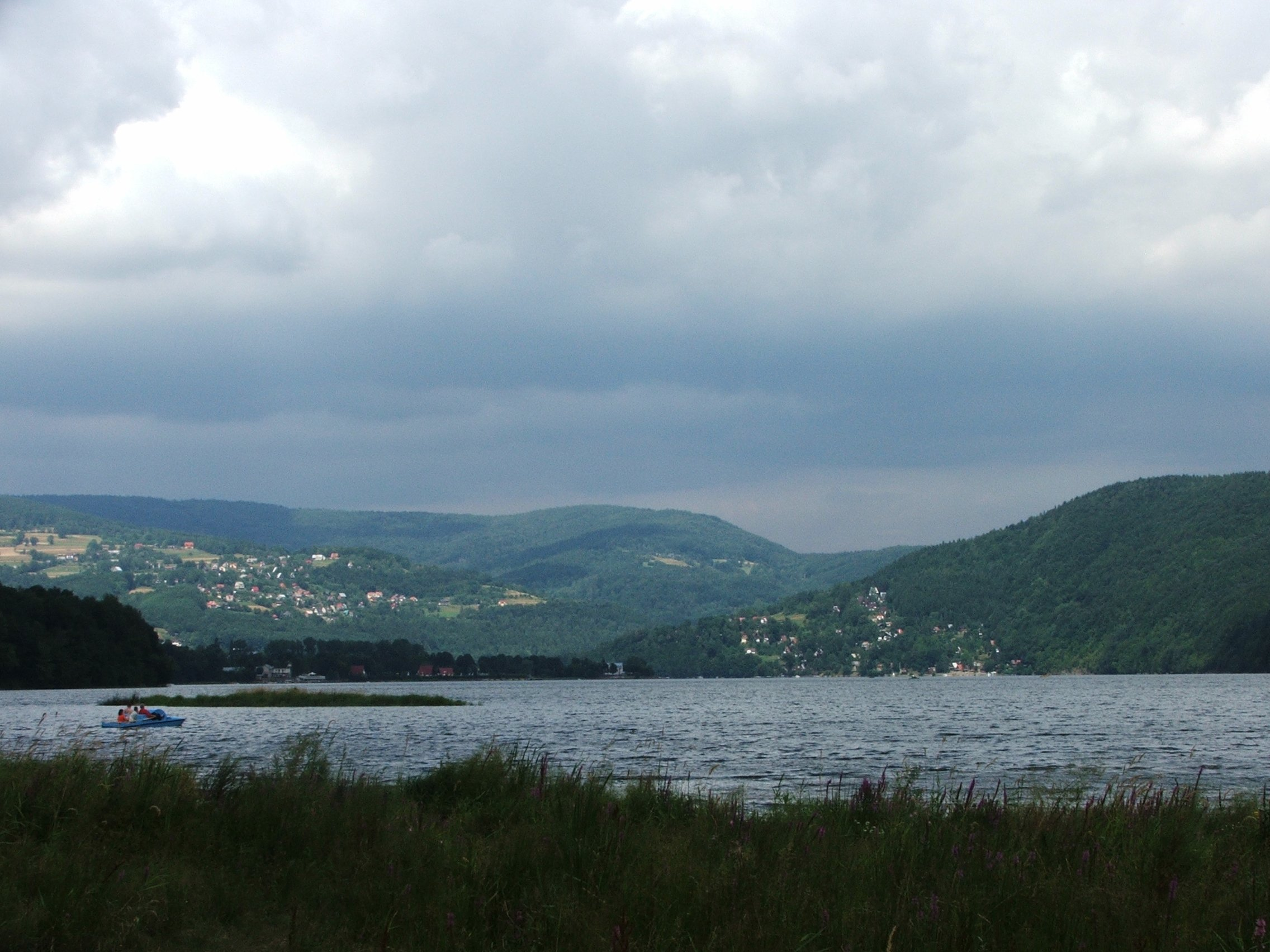 Lake Międzybrodzie from Międzybrodzie Żywieckie